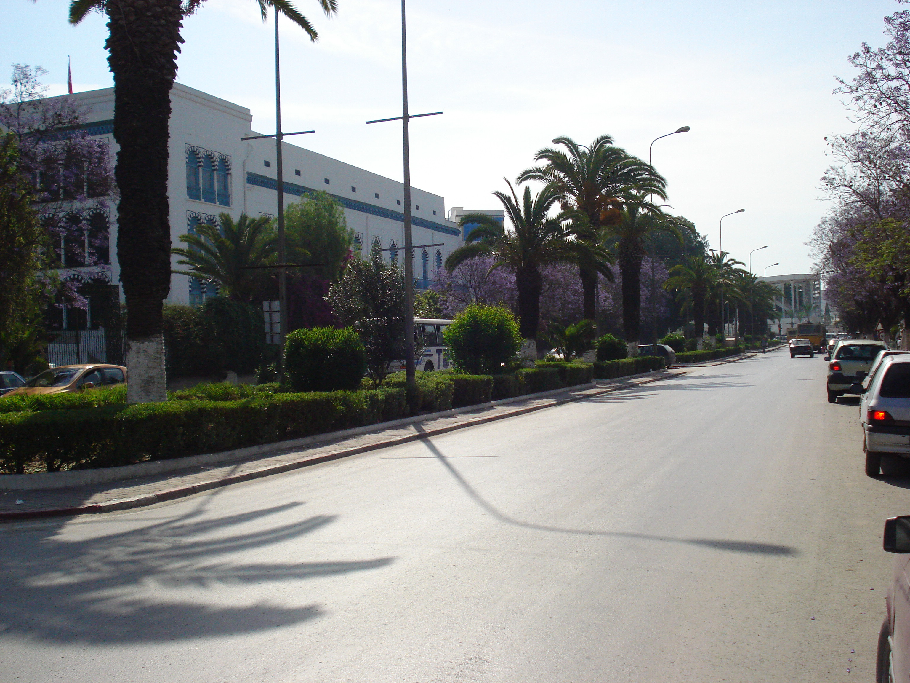 Avenue 20 Mars in Bardo (Tunisia)